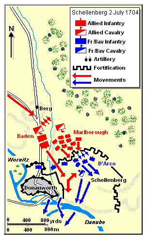 map